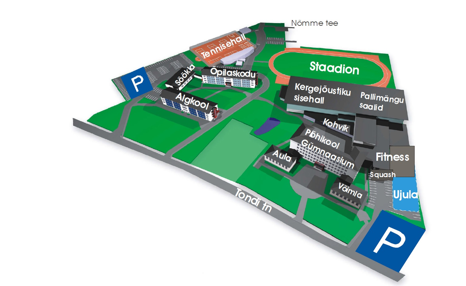 Audentese kompleks